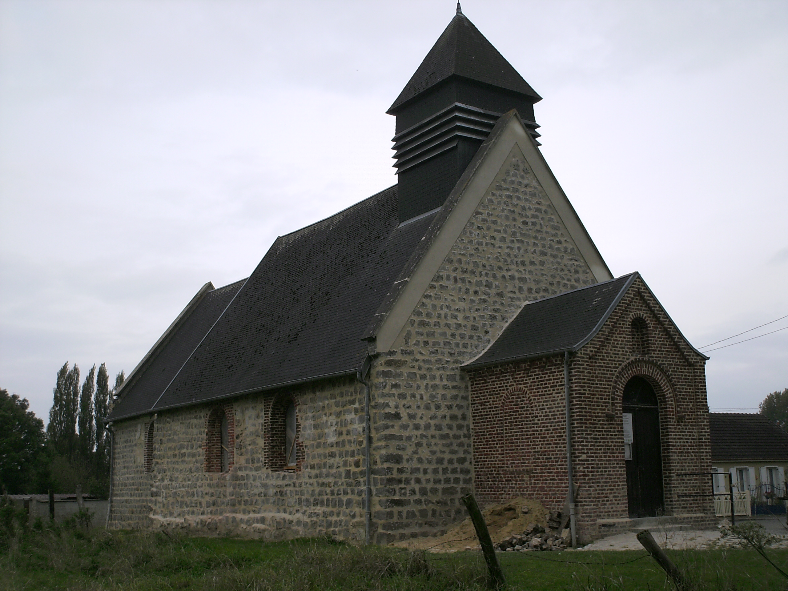 Annois (Aisne, France) - L'église.